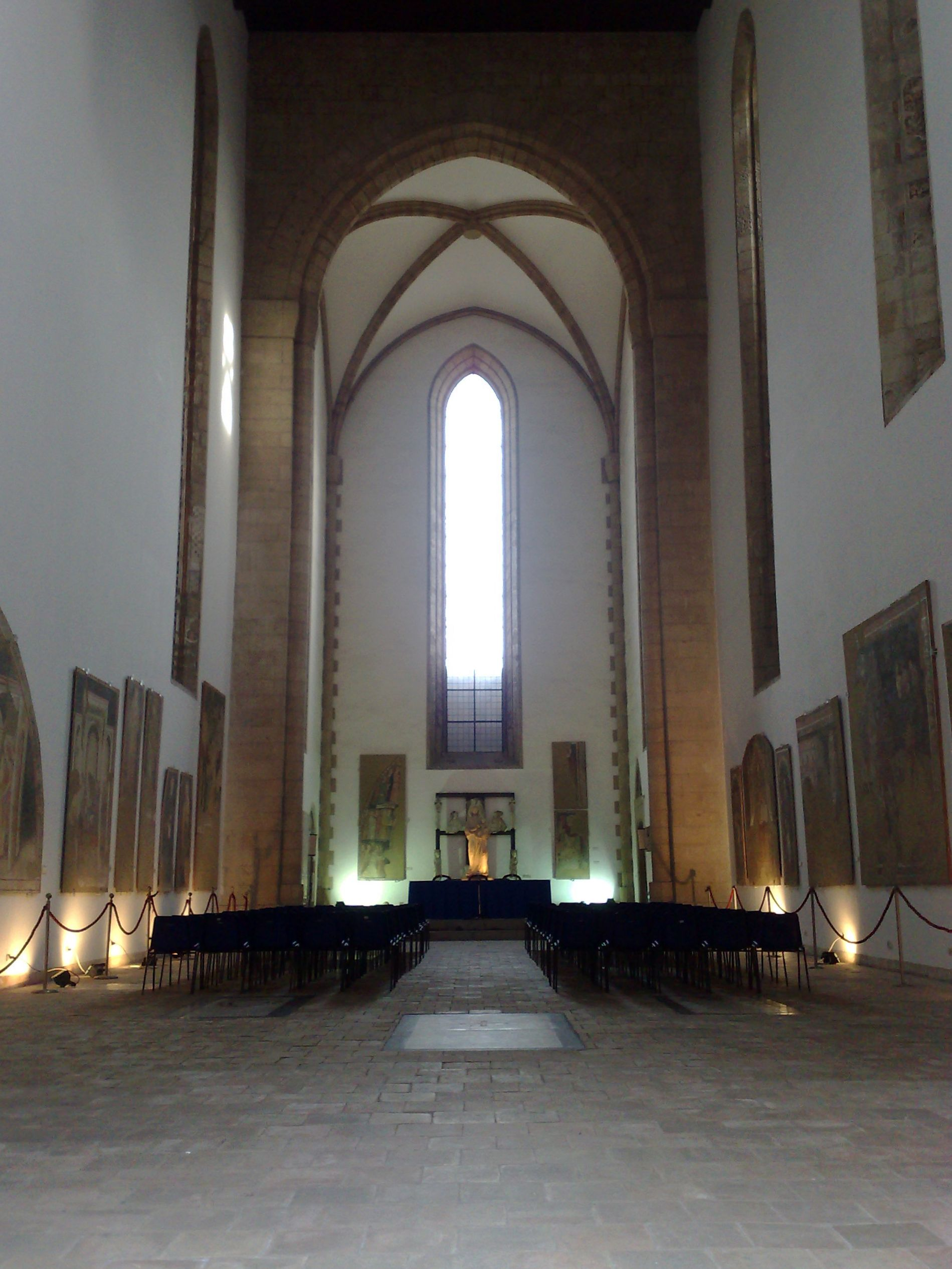 Interni della Cappella Palatina nel Maschio Angioino a Napoli